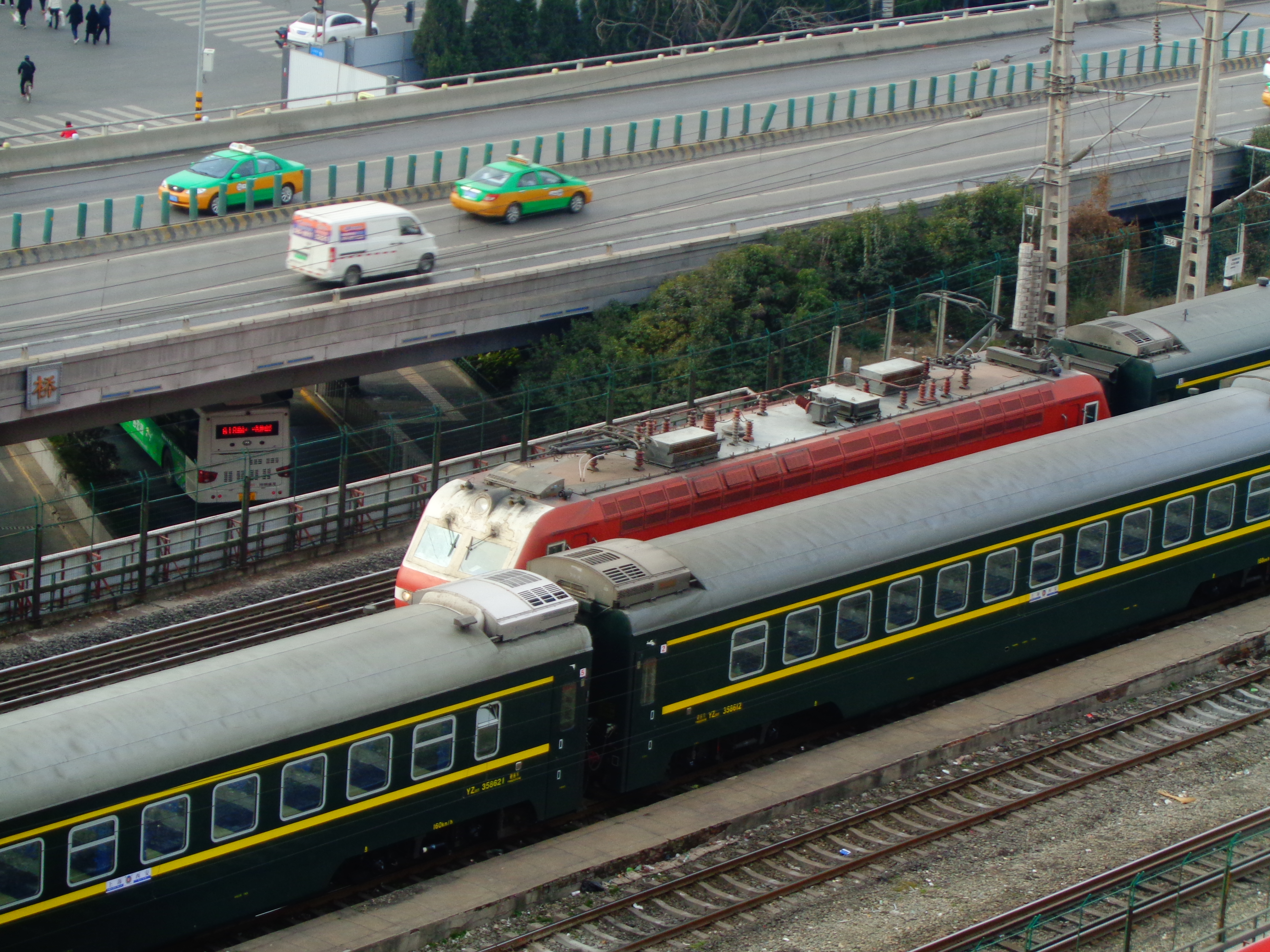 西安市新城区安远门前的陇海铁路，车来车往，有从正线进站或出站的，也有停在侧线上的车皮，也有两辆往来的东风调机单机通过或牵引车皮进出站。